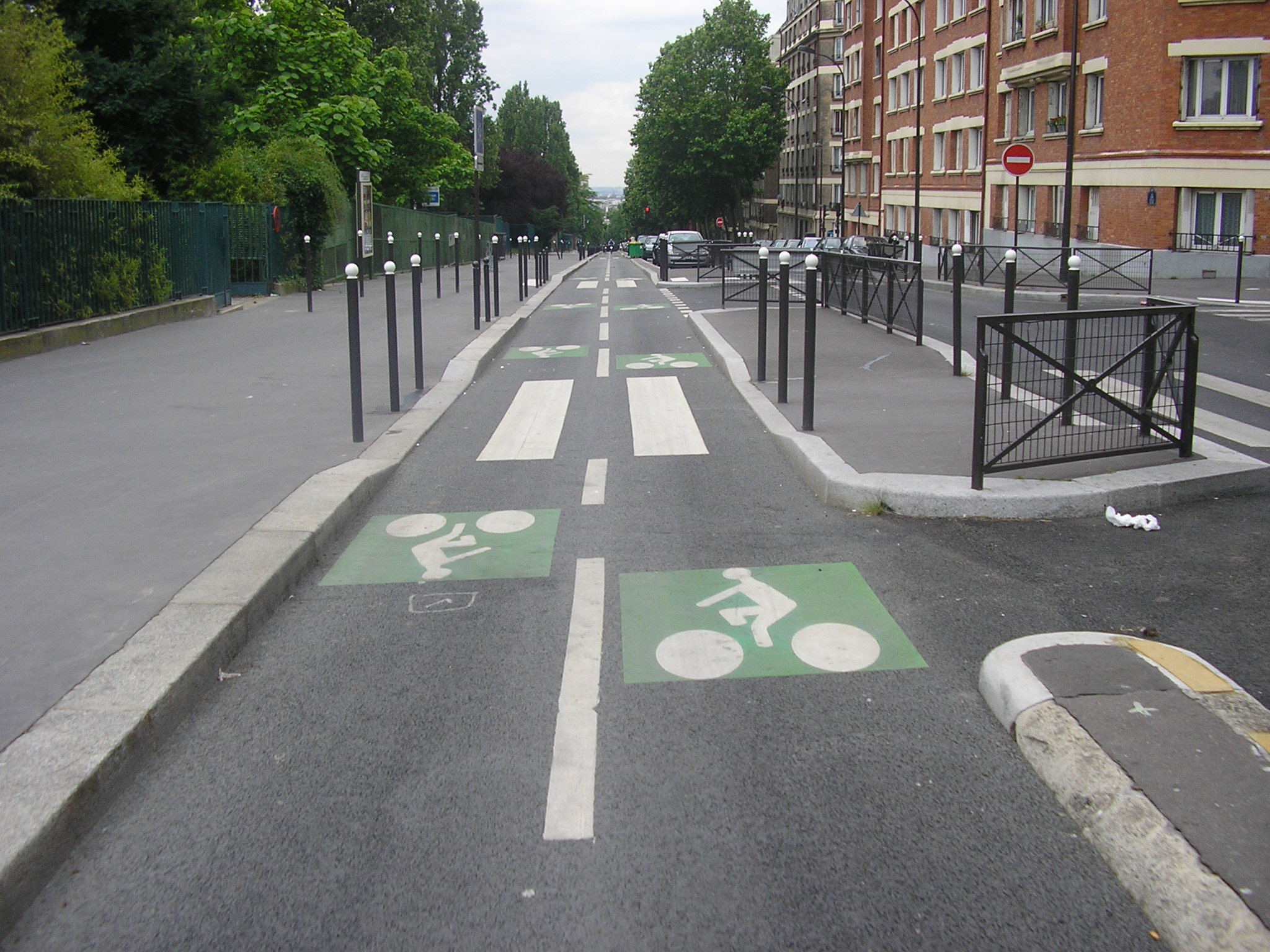 Piste cyclable à Paris en « site propre ». Croisement des rues Le Vau et du Docteur-Labbé.